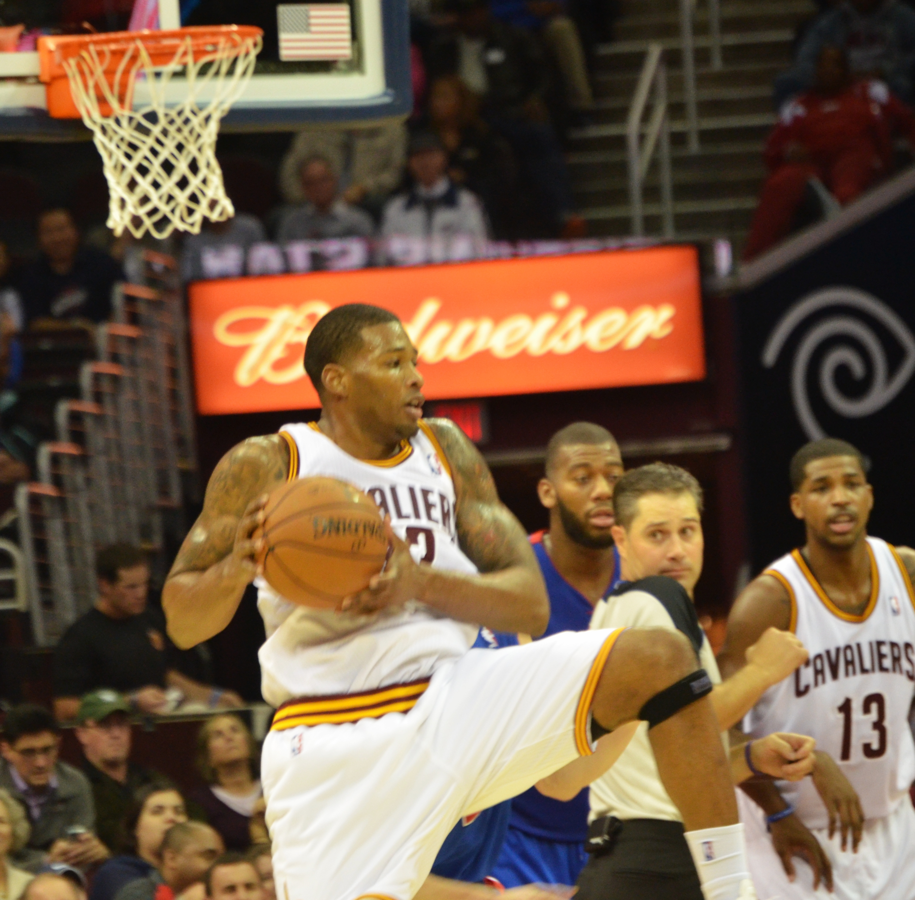 Alonzo Gee